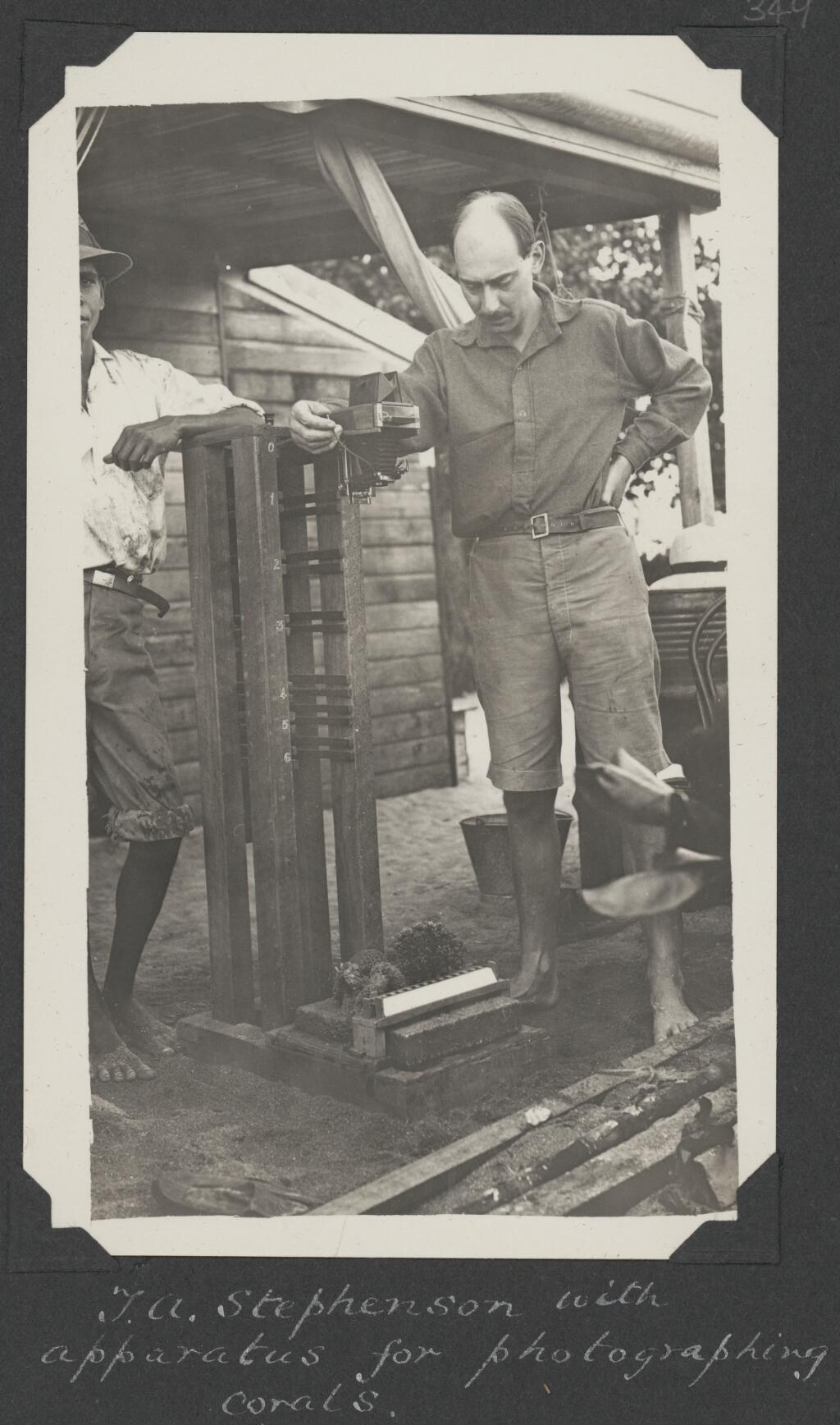 Yonge, C. M. (Charles Maurice), 1899-1986 Persistent URL .au/nla.obj-145095643